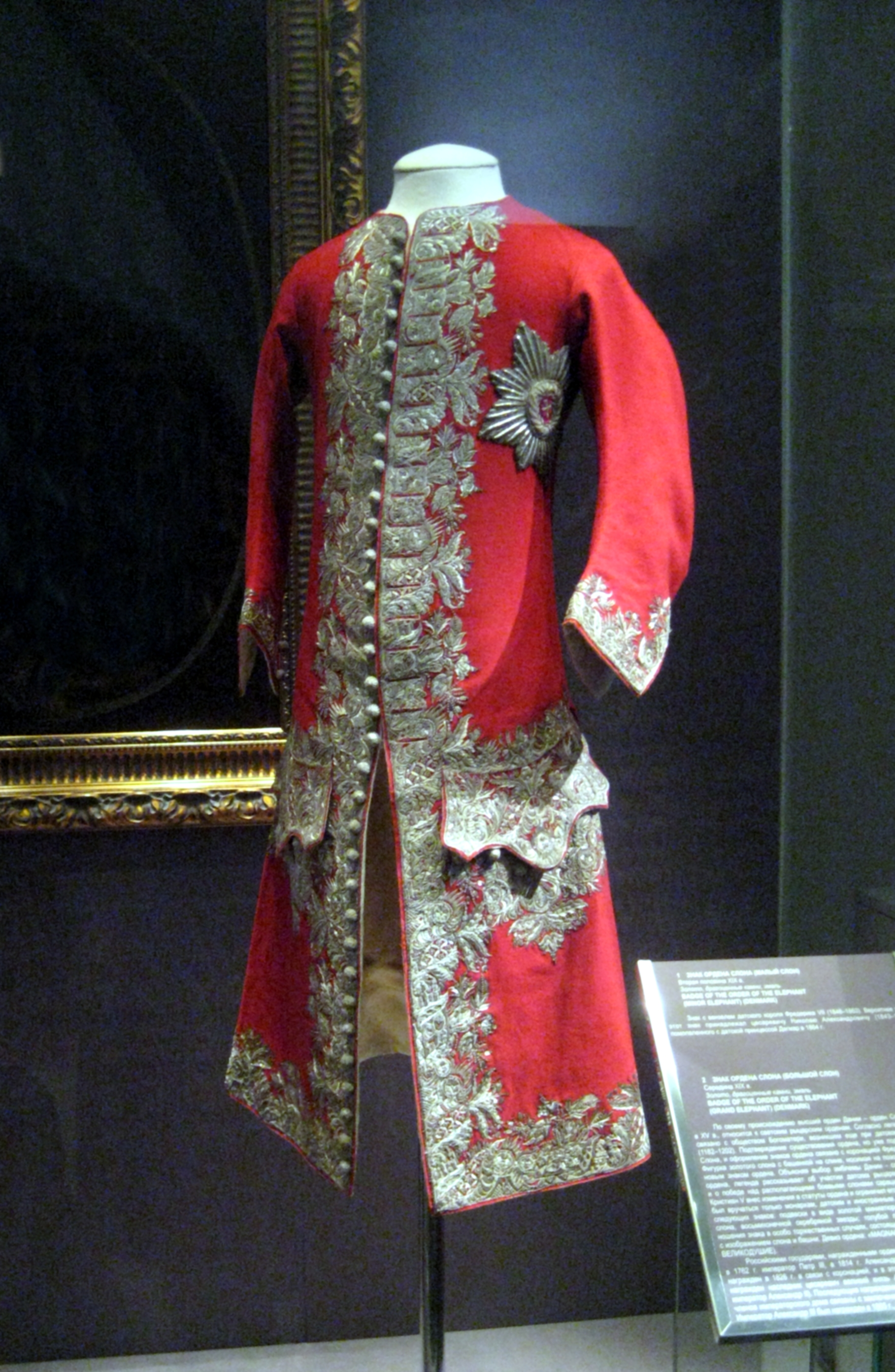 Камзол императора Петра II. Франция, 1727-30. Музеи Московского Кремля